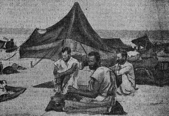 La dernière photographie du lieutenant de Mac-Mahon (au premier plan) prise au puit de Toueïla, quatre jours avant sa mort. Au deuxième plan à droite, le capitaine Delange.